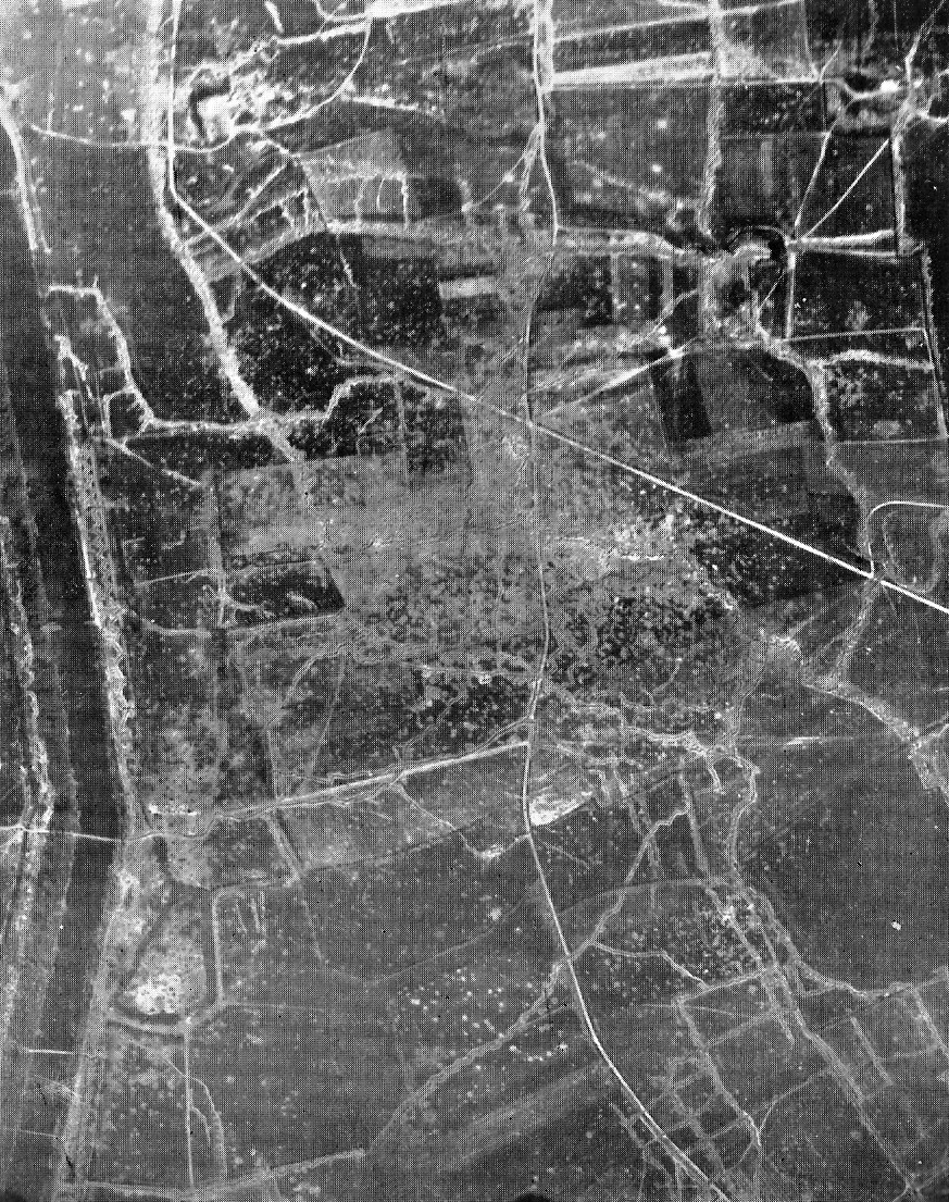 Das Kampfgelände bei Pilkem (Fliegerphotographie)